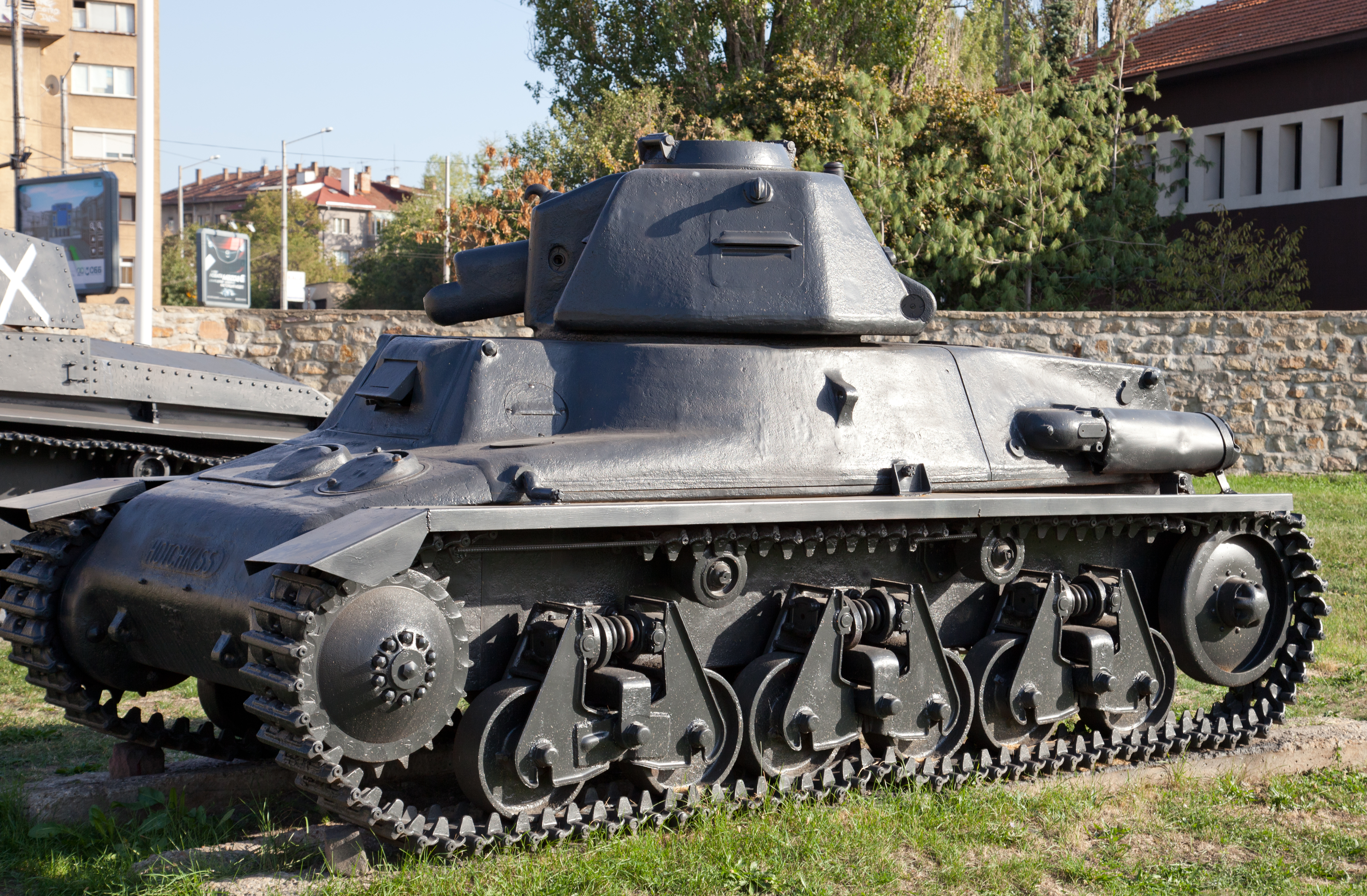 Sofia; der "Frauenmarkt" (Schenski pasar)